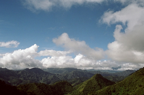 Cordillera Central (Luzon), Philippines